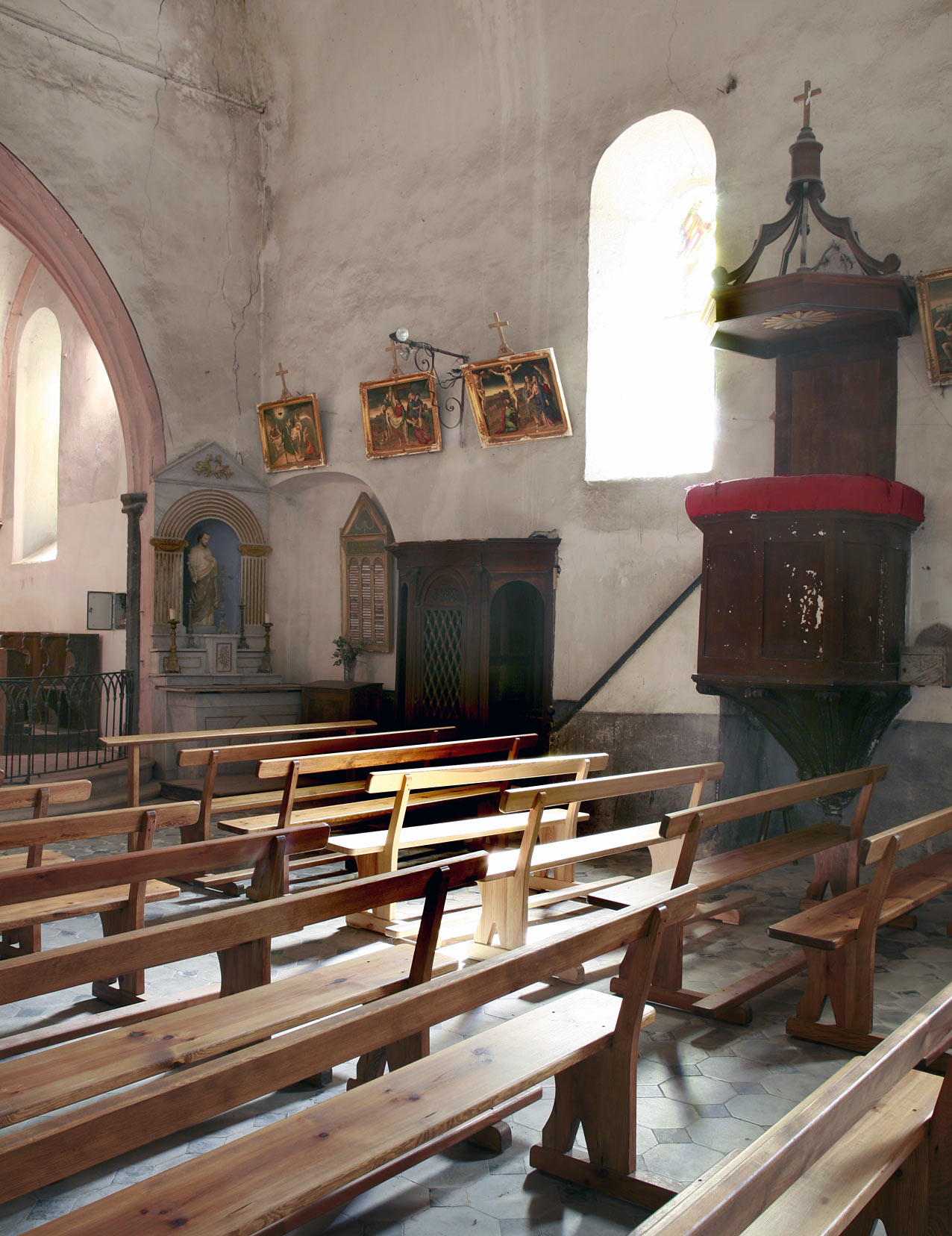 Intérieur de l'église de Saint Pierre aux Liens. Châteauneuf de Mazenc